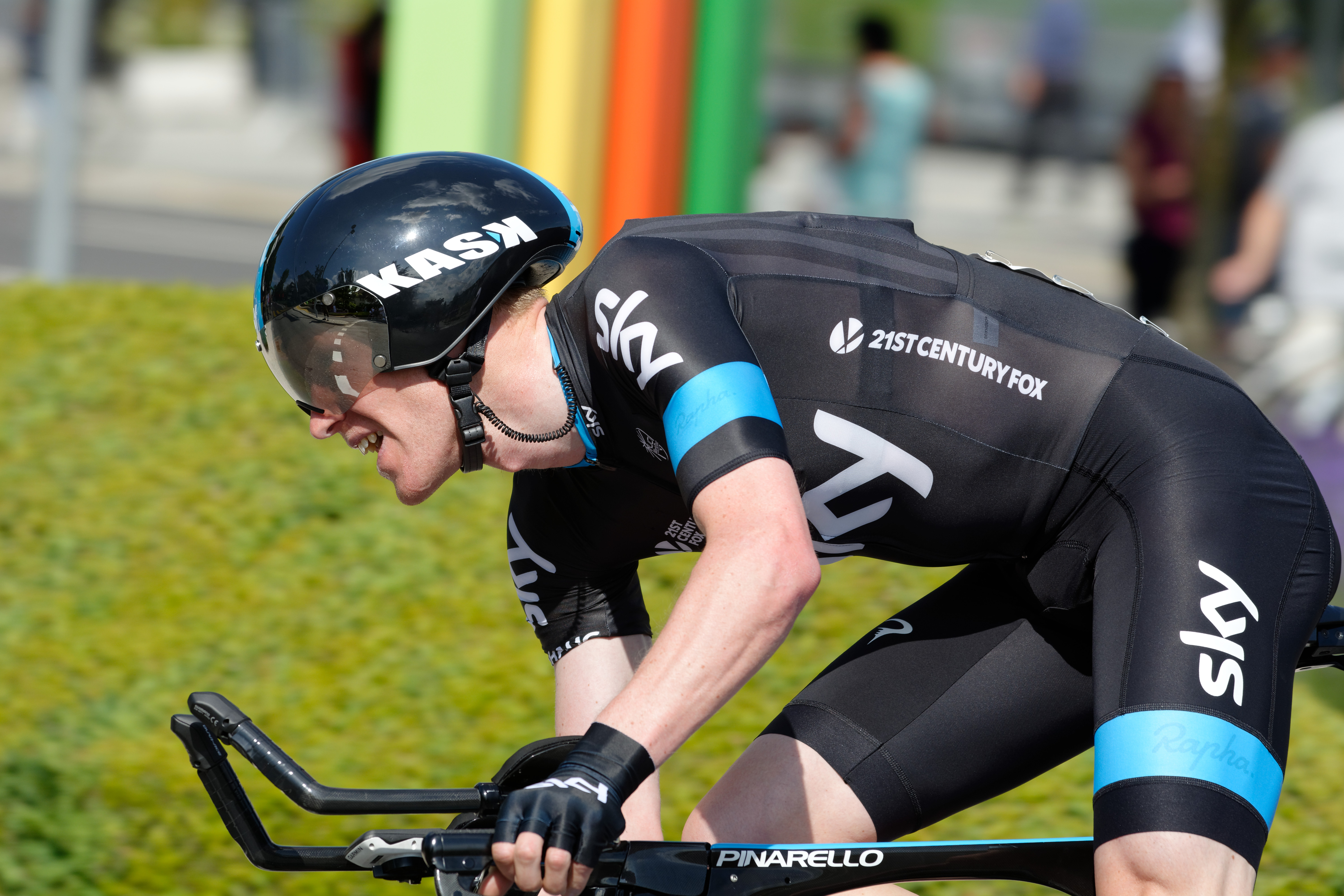 D71_9337_DxO